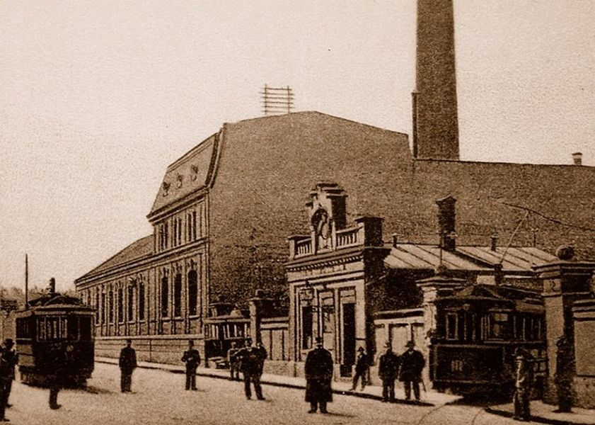 Bleichstraße (dziś Partyzantów) w Bielsku-Białej w pierwszej dekadzie XX wieku. Widok na elektrownię (wraz z jej nieistniejącym już kominem) oraz parterowy budynek sklepowy i bramy zajezdni tramwajowej, z której właśnie wyjeżdza wagon. Sklepik został wyburzony w okresie międzywojennym i postawiono w jego miejscu funkcjonalistyczną kamienicę. Zarówno ona, jak i bramy zajezdni zostały zniszczone w latach 70. XX wieku podczas poszerzania drogi.